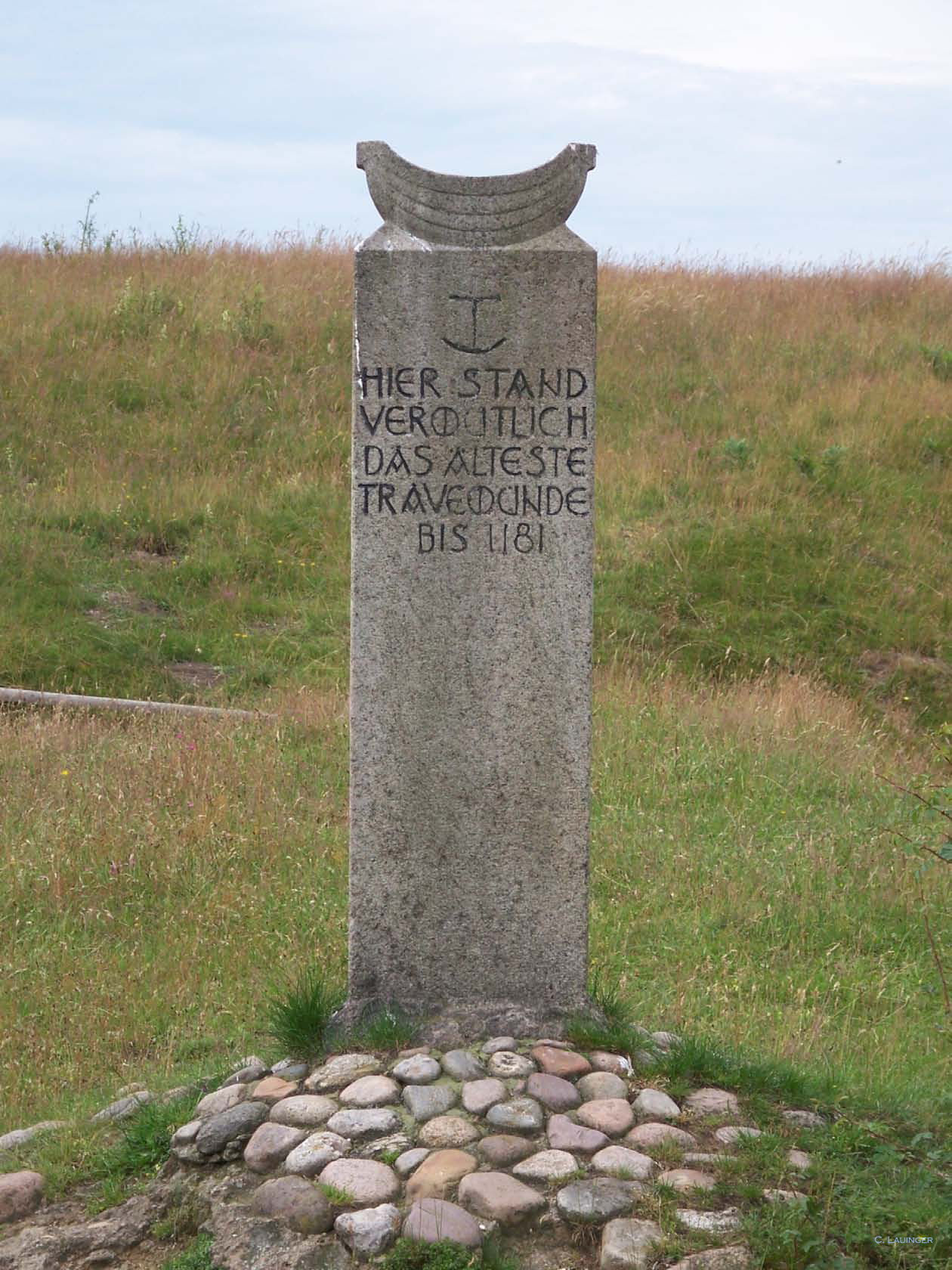 Gedenkstein Stülper Huk mit Inschrift „HIER STAND VERMUTLICH DAS ÄLTESTE TRAVEMÜNDE BIS 1181“